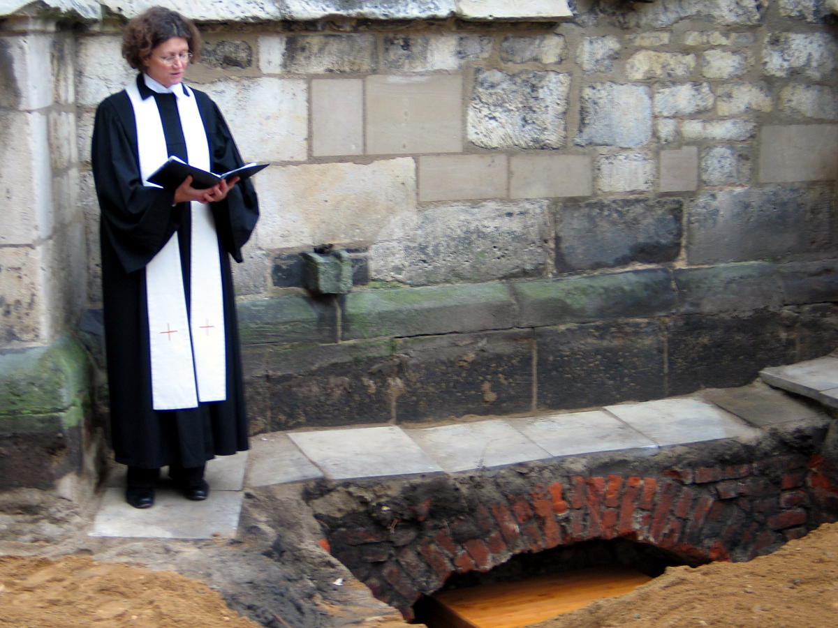 Rede der Pastorin Hanna Kreisel-Liebermann an der Nikolaikapelle zur Wiederbestattung der aufgefundenen Gebeine ...